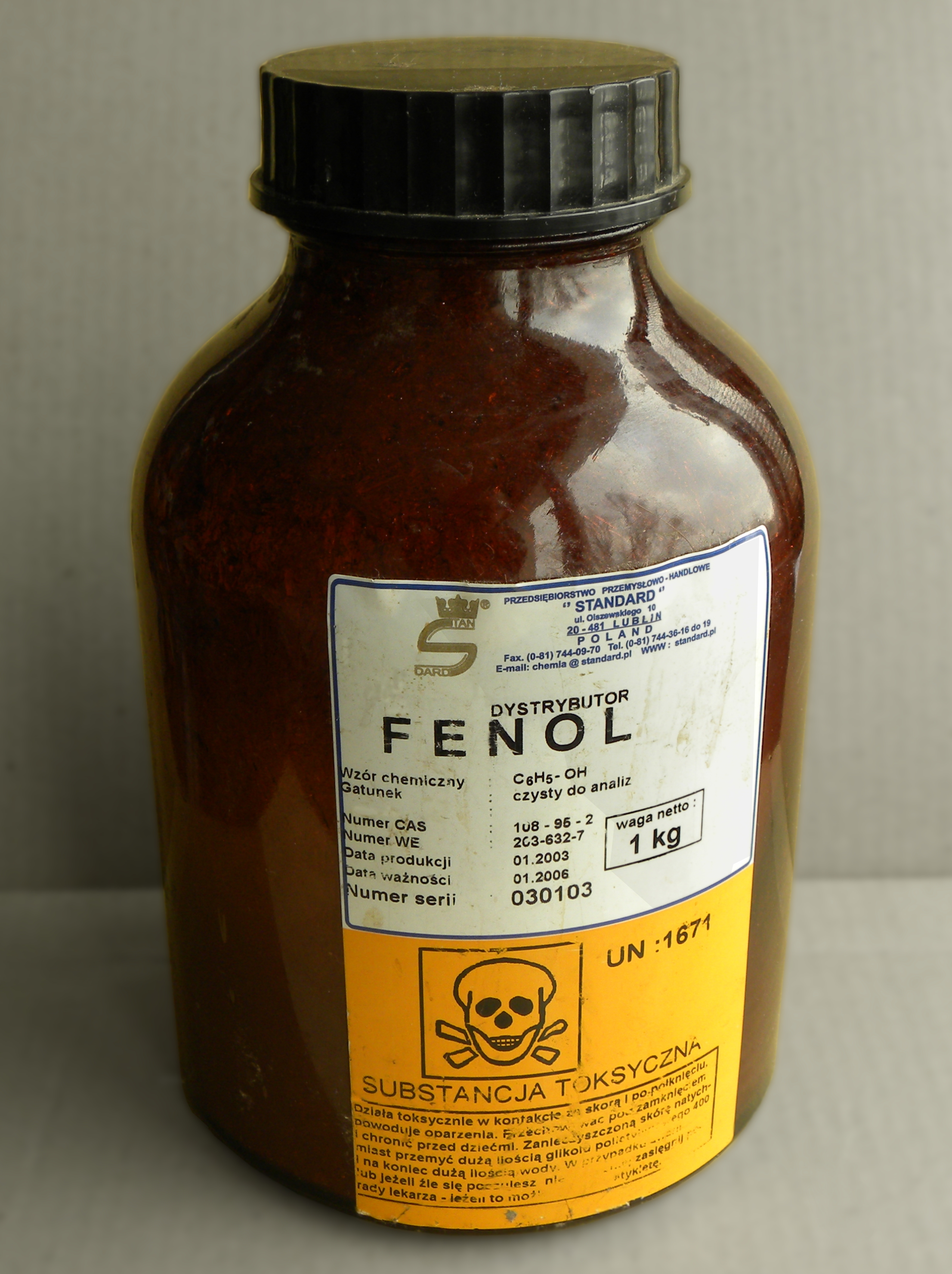 Słoik z fenolem